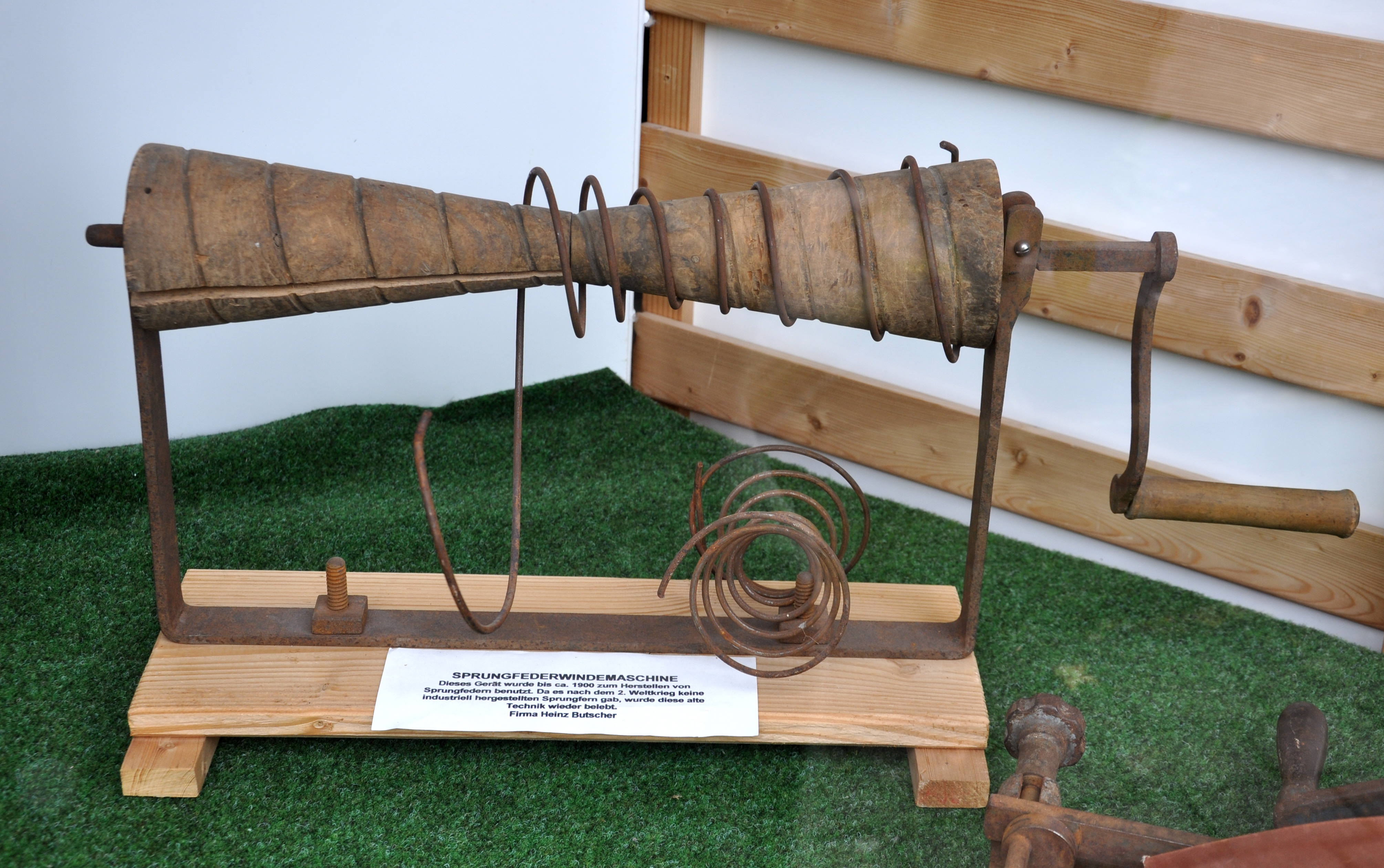 Bordesholm, Polsterei Heinz Butscher, Ausstellung im Schaufenster: historische Sprungfederwindemaschine